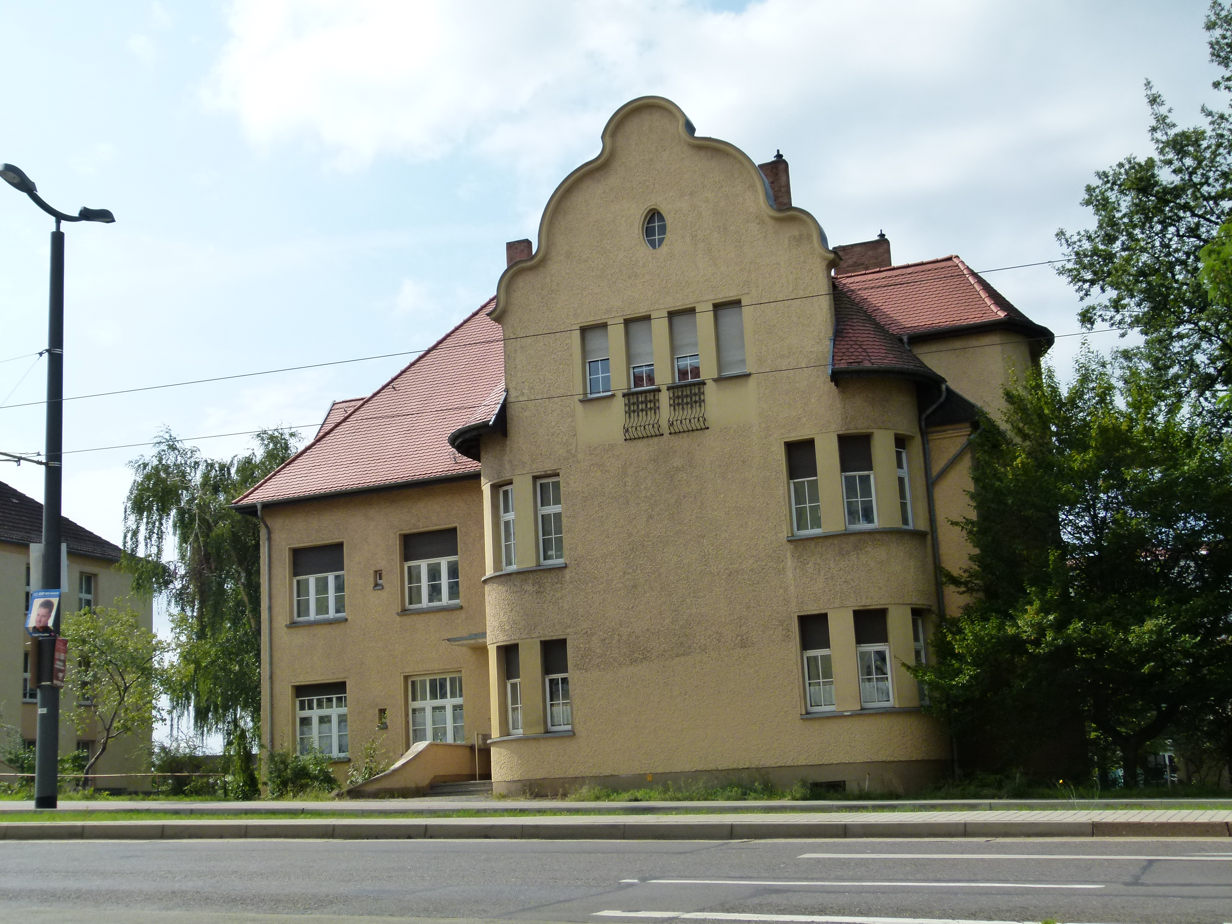 41 Bahnhofstraße 2014